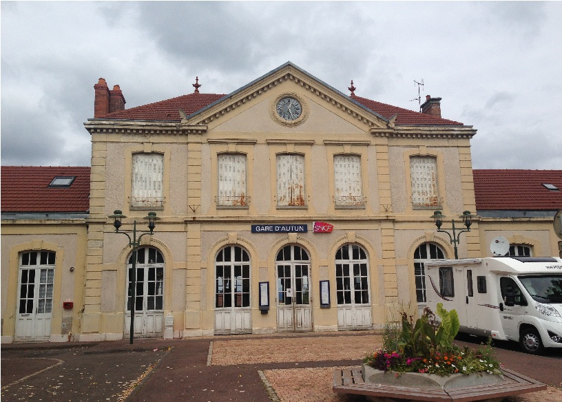 Gare d'Autun-2015